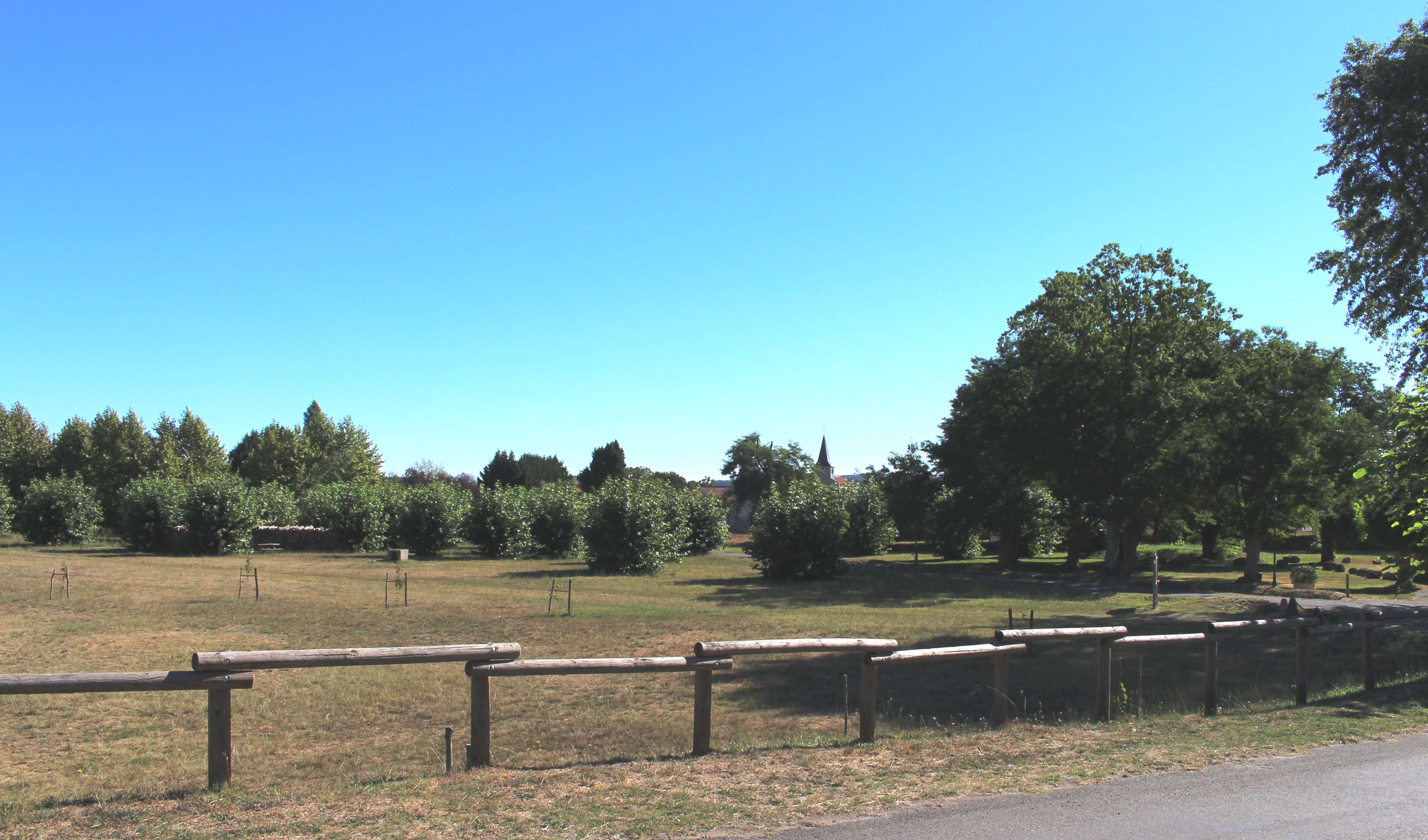 Place du village d'Estirac (Hautes-Pyrénées)